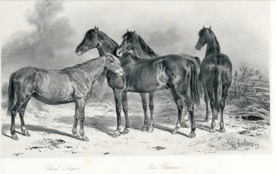 Gravure du cheval solognot et du cheval brennou dans l'Atlas statistique de la production de chevaux en France, 1850